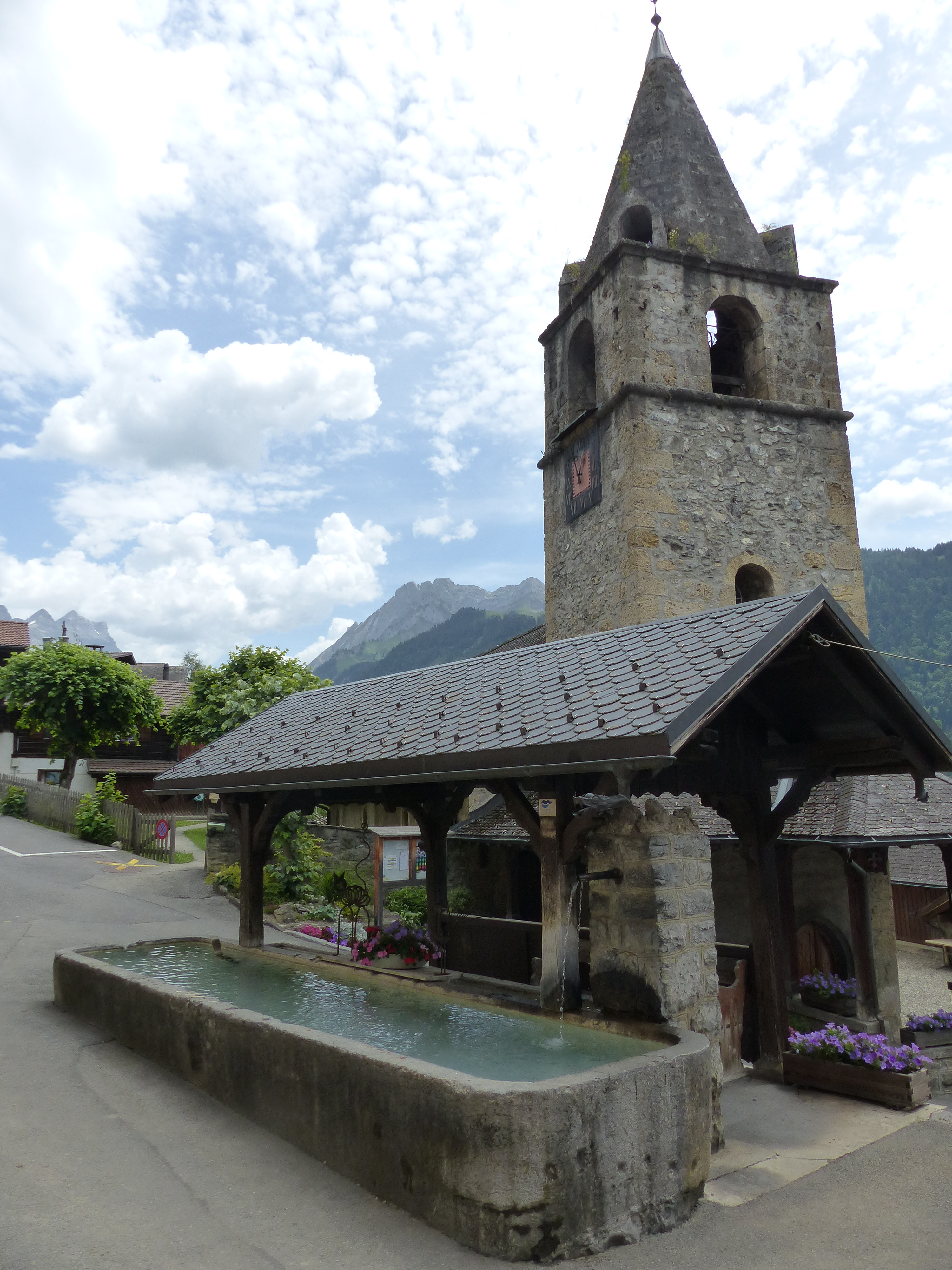 Die protestantische Kirche von Gryon.